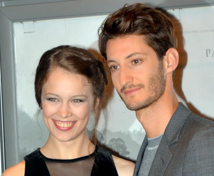 Paula Beer et Pierre Niney à l'avant-première parisienne de "Frantz"